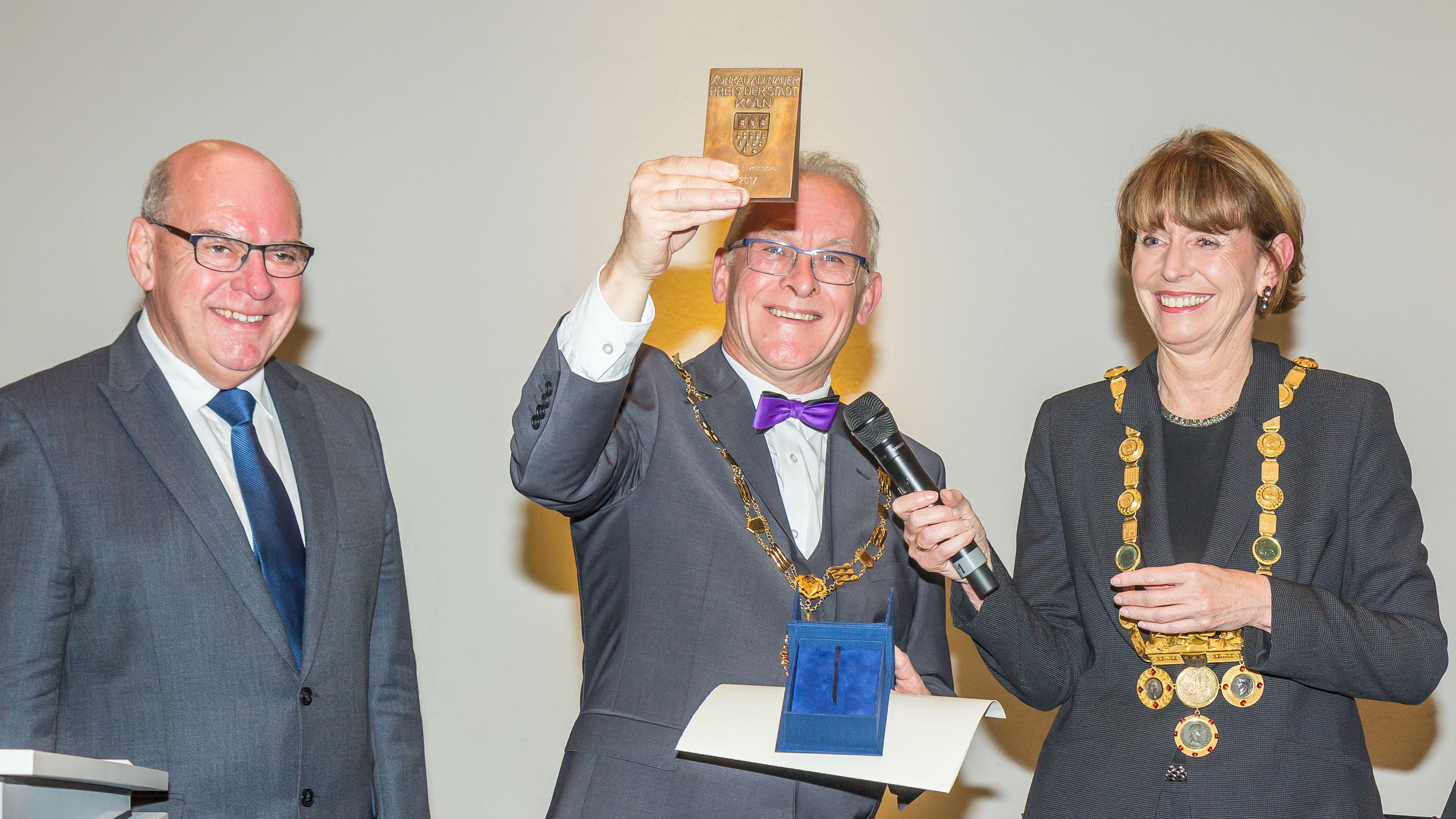 Verleihung Konrad-Adenauer-Preis der Stadt Köln 2017 an Liverpool Foto: Oberbürgermeisterin Henriette Reker überreicht den Preis an Lord Mayor Malcolm Kennedy, Oberbürgermeister von Liverpool. Links: Daniël Termont, Präsident von Eurocities und Oberbürgermeister von Gent